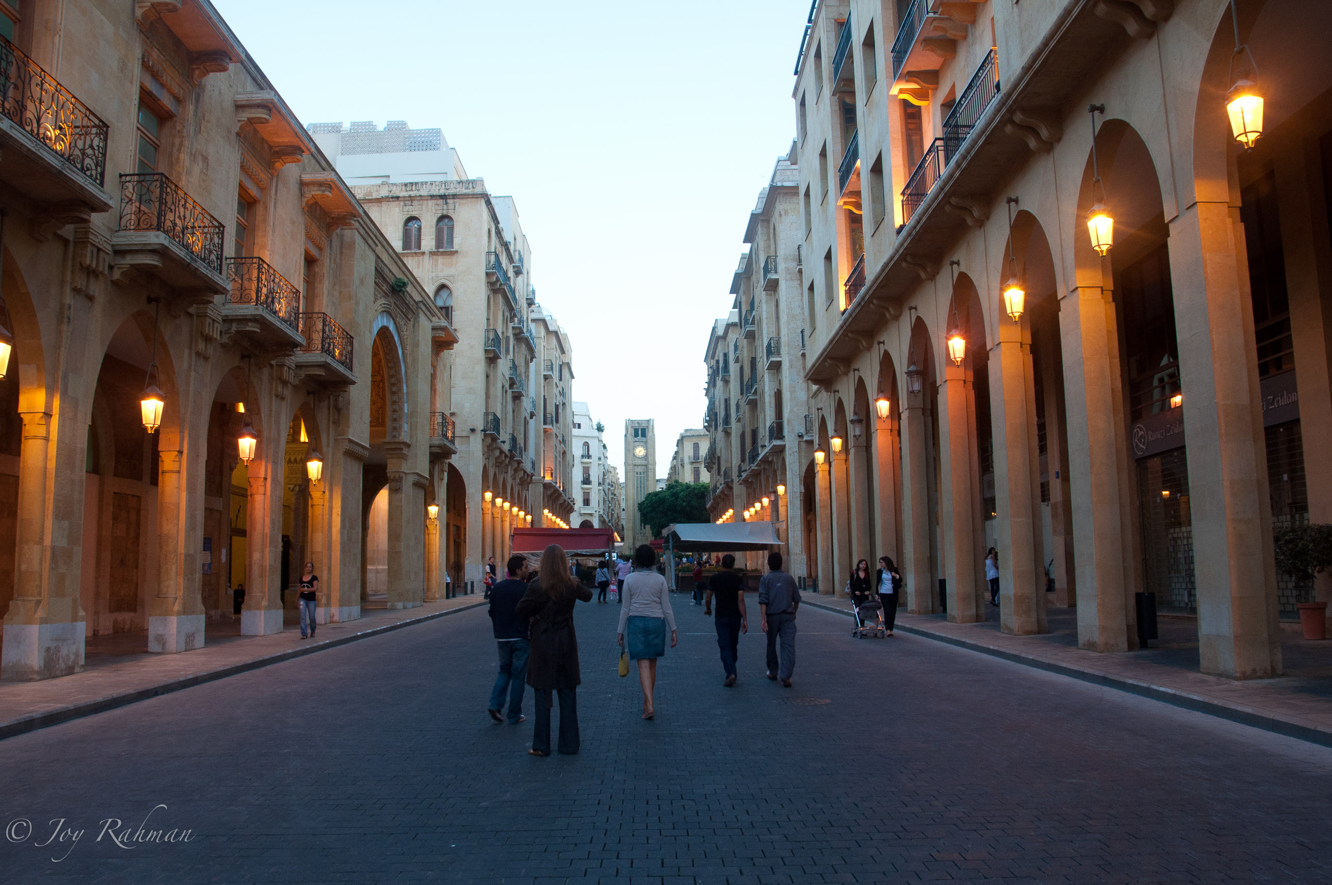 Beirut